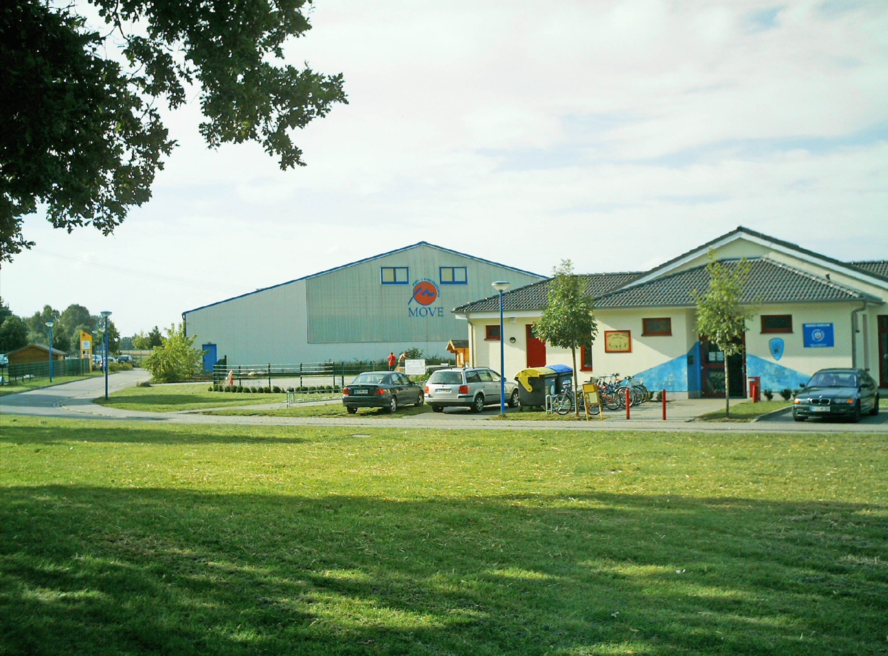 Eggesin: große Sporthallen, Wellness, Skatepark, Vereinsräume